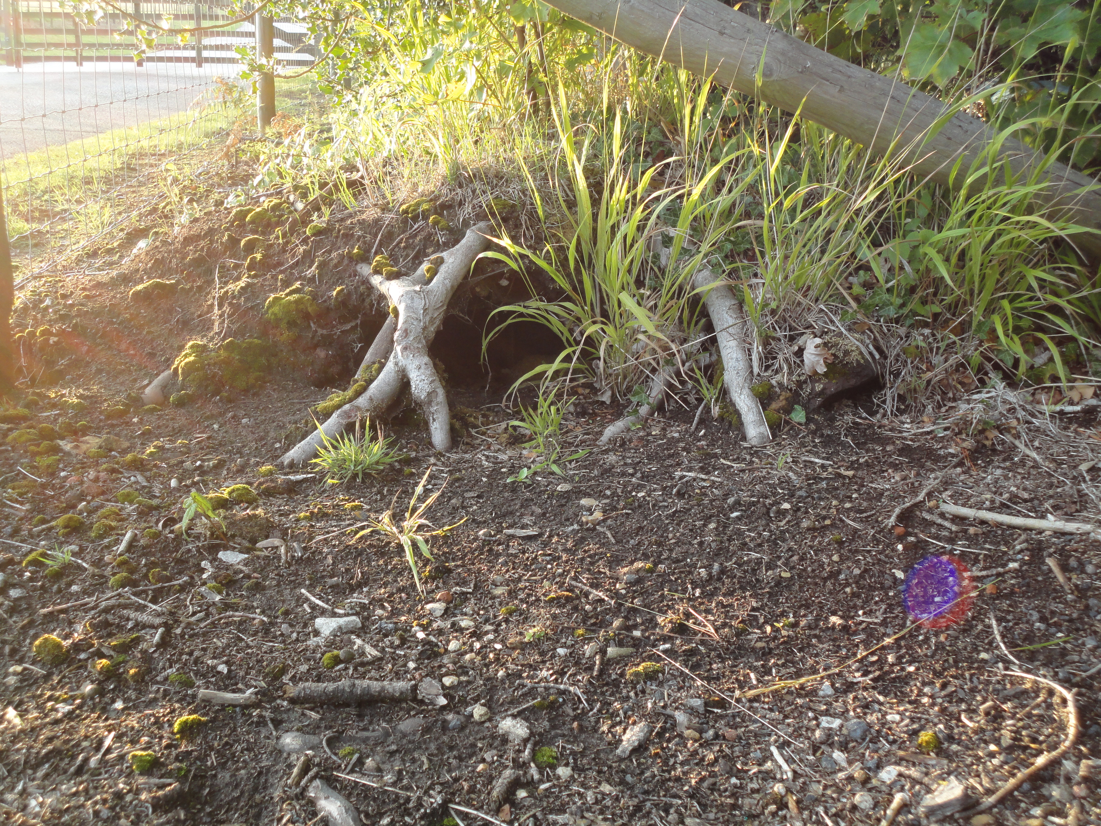 Заячья нора.